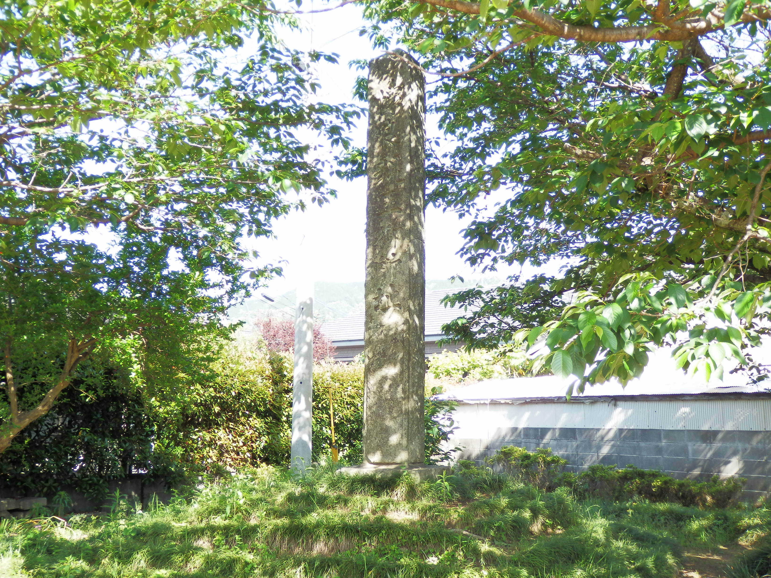 征西府高田御所跡、「懐良親王御所址」碑（熊本県八代市）